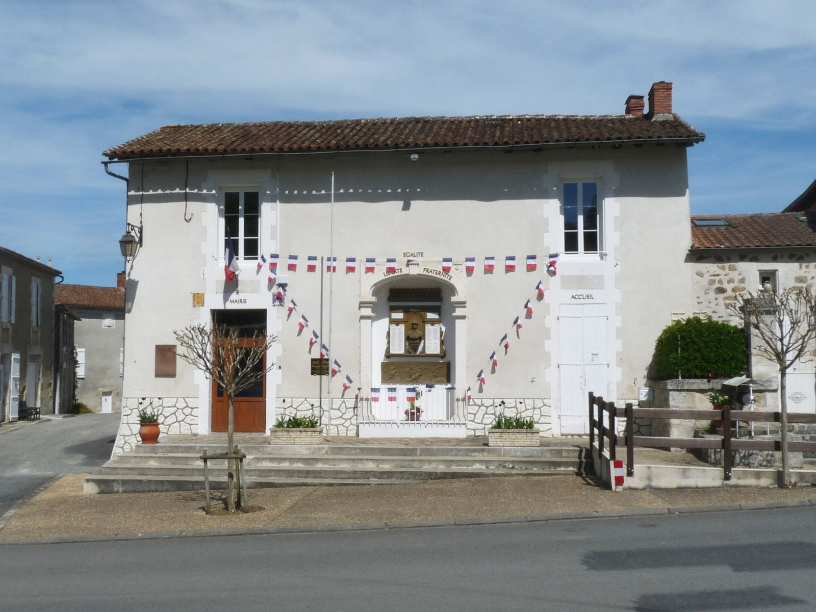 Mairie de Cherves-Châtelars, Charente, France